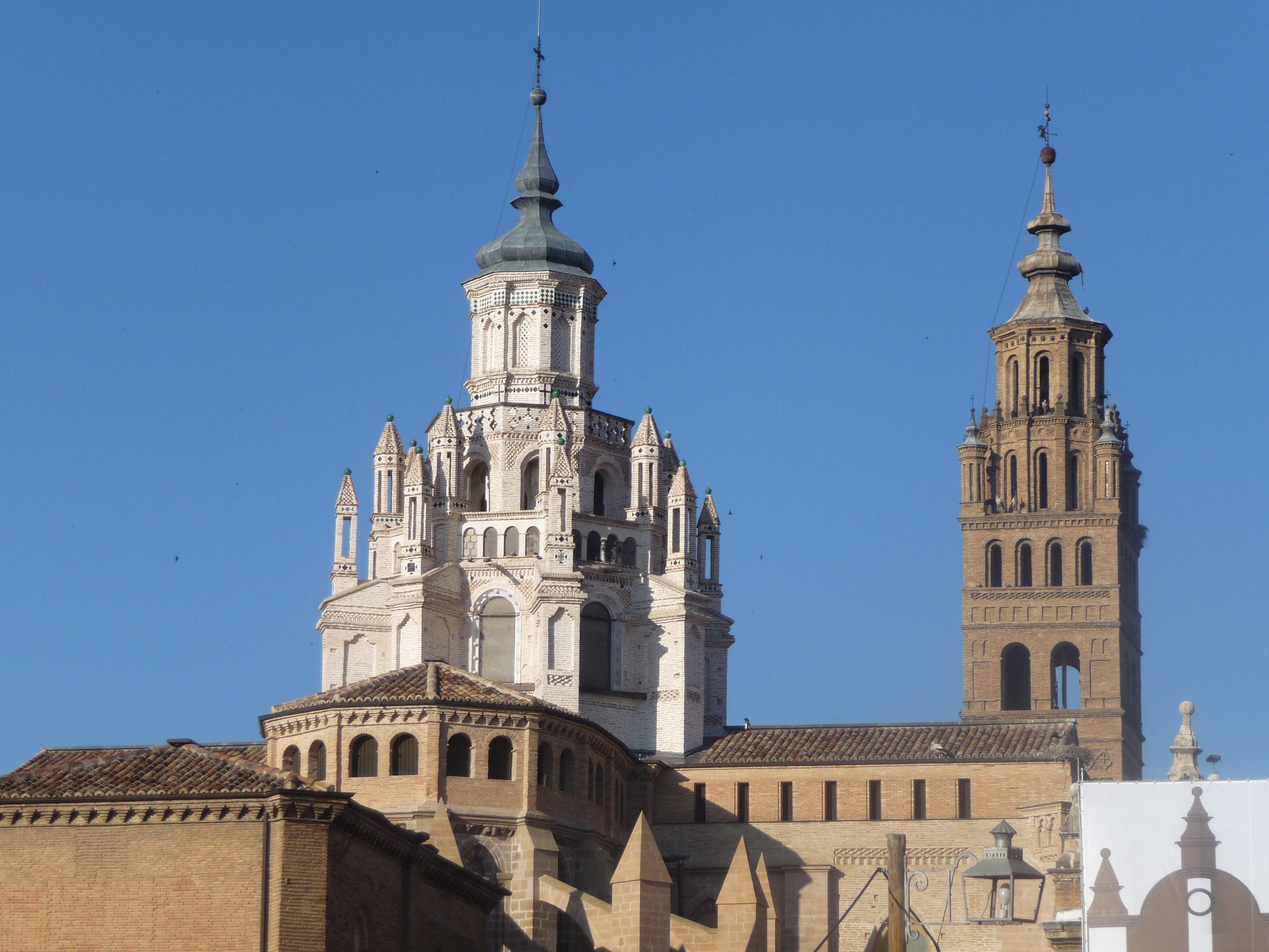 style mudéjar roman gothique et renaissance